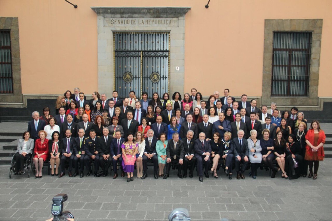 Foto de la Asamblea Constituyente de la Ciudad de México fuera de la ex sede del Senado de México.